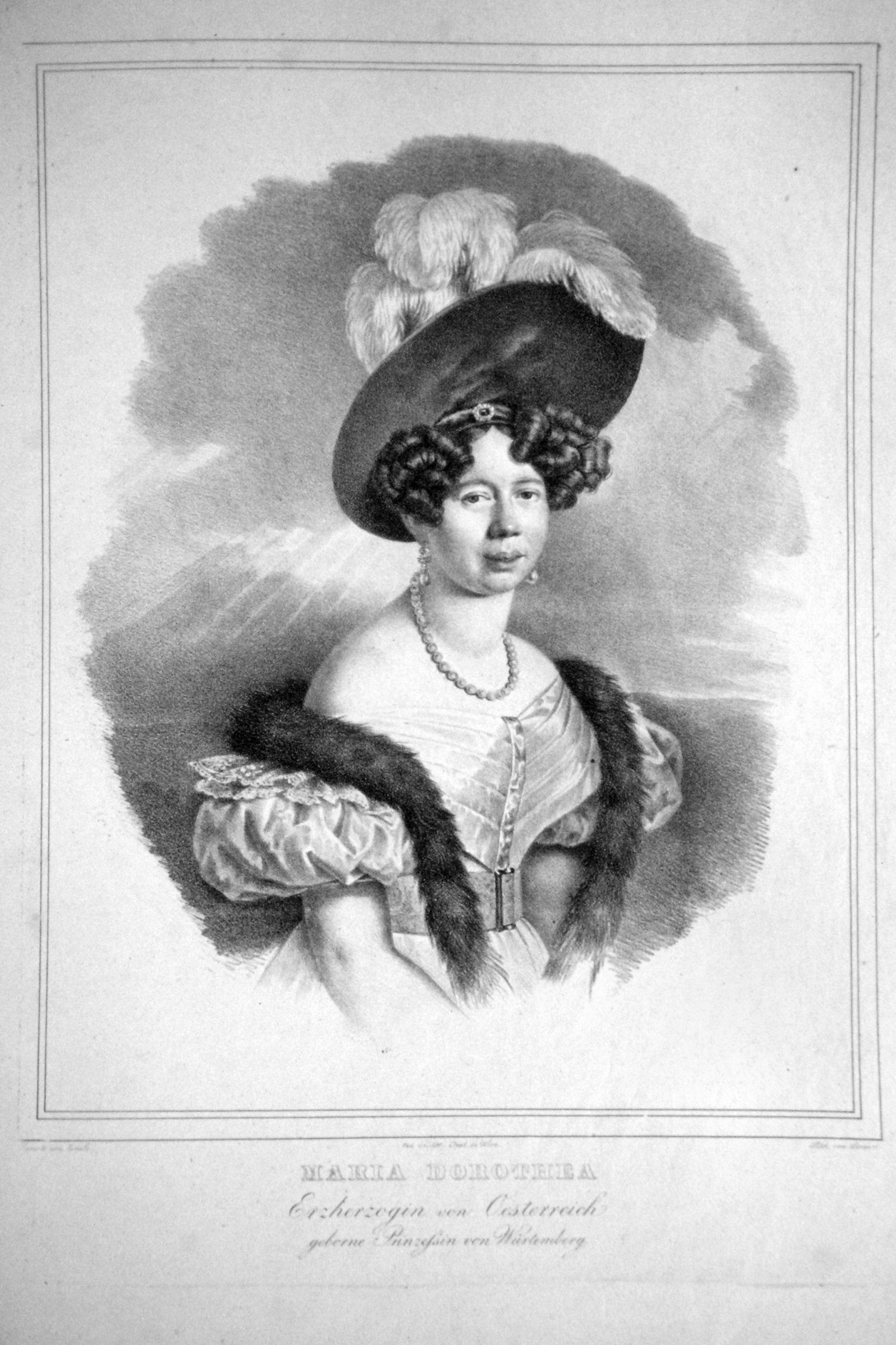 Maria Dorothea von WÜrttemberg (1797-1855), Erzherzogin, Ehefrau von Erzherzog Josef Paltin von Ungarn. Lithographie von Friedrich Lieder, nach einem Gemälde von Anton Einsle.